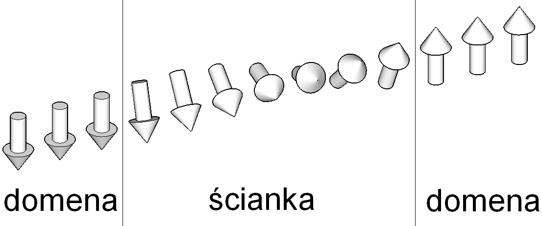 Schematyczne przedstawienie zmiany kierunku wektorów momentów magnetycznych w ściance domenowej pomiędzy dwoma domenami (rysunek nie w skali)